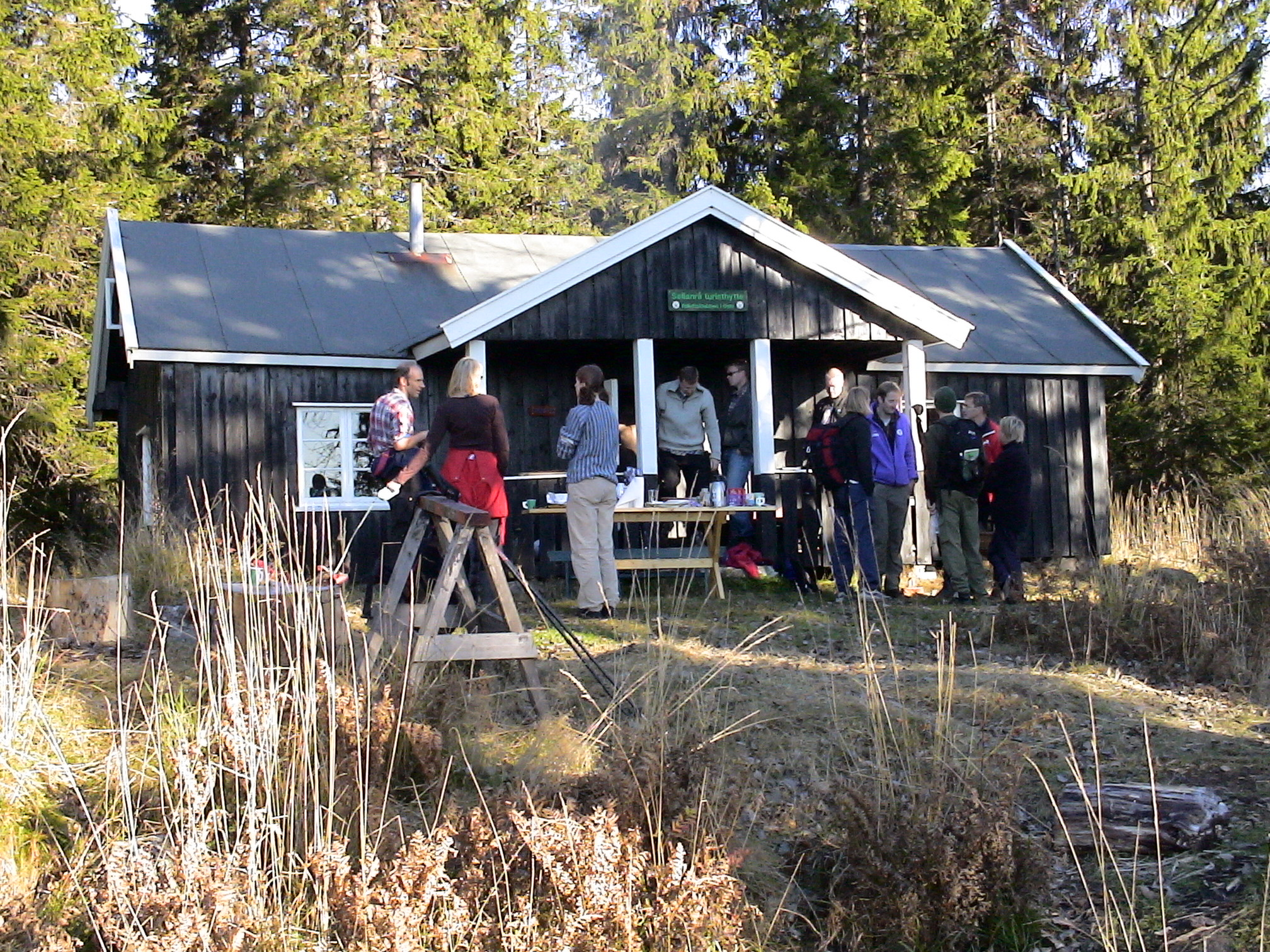 Sellanrå Turisthytte, Nordmarka, Oslo, Norway